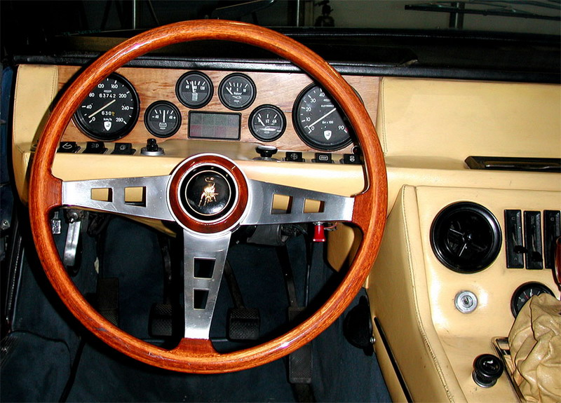 1972 Lamborghini Jarama dashboard